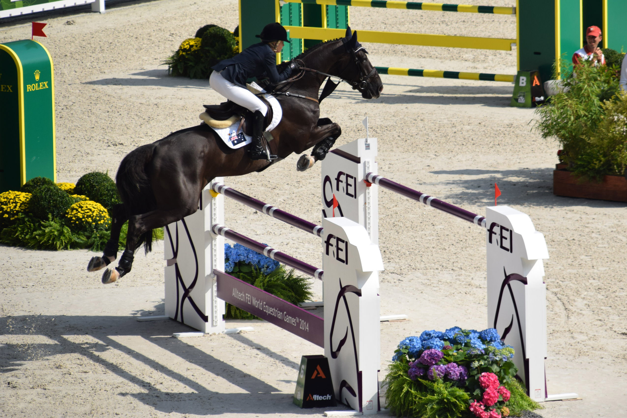 JEM 2014 : Edwina Tops-Alexander et Ego Van Orti en saut d'obstacles